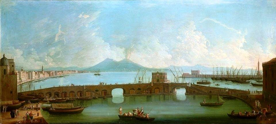 Gabriele_Ricciardelli (attivo a Napoli dal 1743 al 1777) - Napoli, il porticciolo del Mandracchio. Luogo di esposizione sconosciuto.